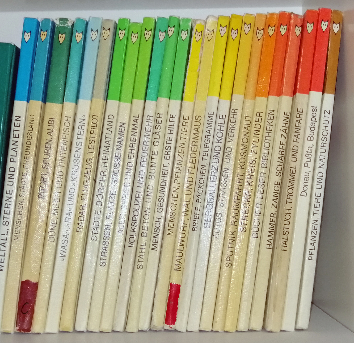 Verschiedene Ausgaben der DDR-Kinderbuchreihe Mein kleines Lexikon